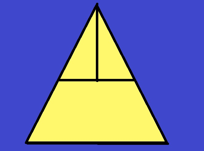 1వ రకం-పులిజూదం